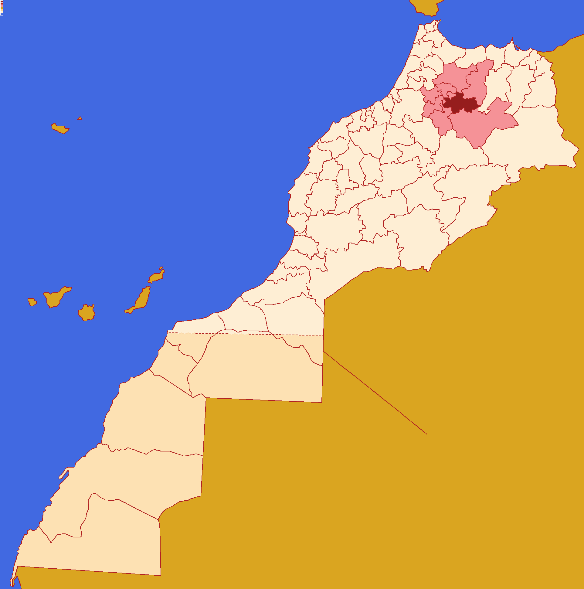 Localização da província de Séfrou ,dentro da região de Fez-Meknès e dentro de Marrocos.Conforme a reforma administrativa de 2015.